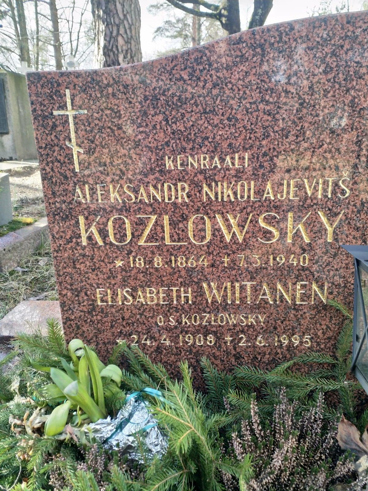 Захоронение Александра Козловского на Никольском кладбище Хельсинки